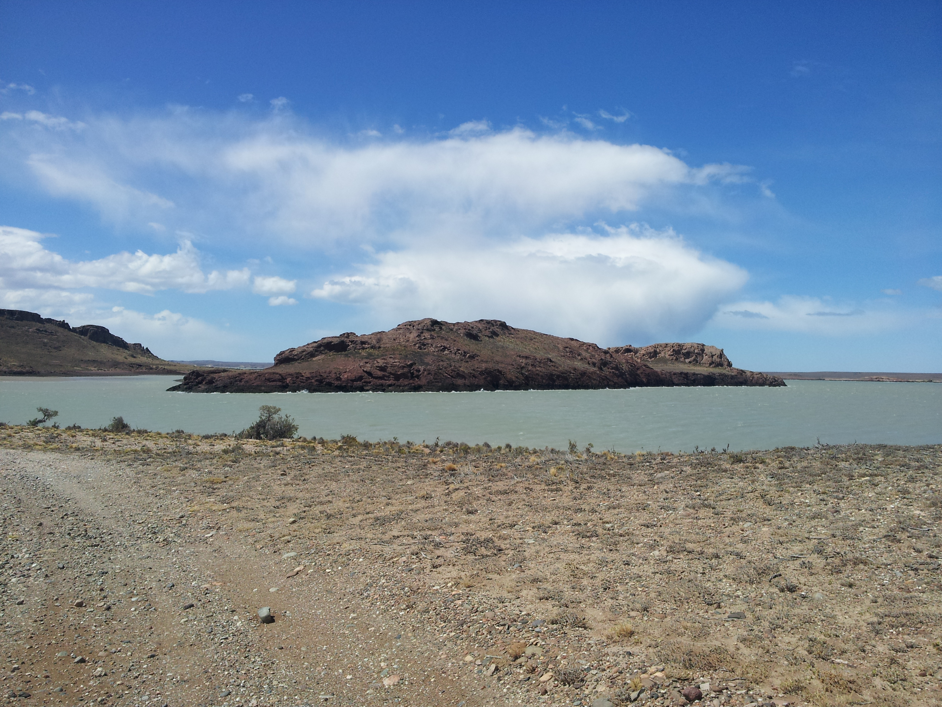 Vista de la Peninsula Stokes desde el sur